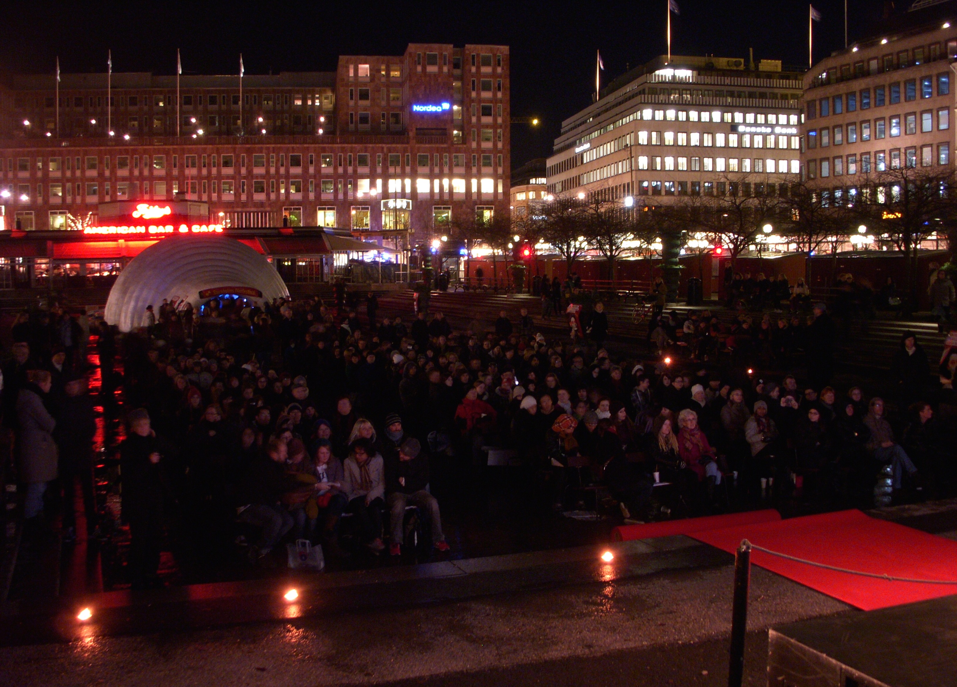 Stockholms filmfestival i Kungsträdgården 21 november 2009